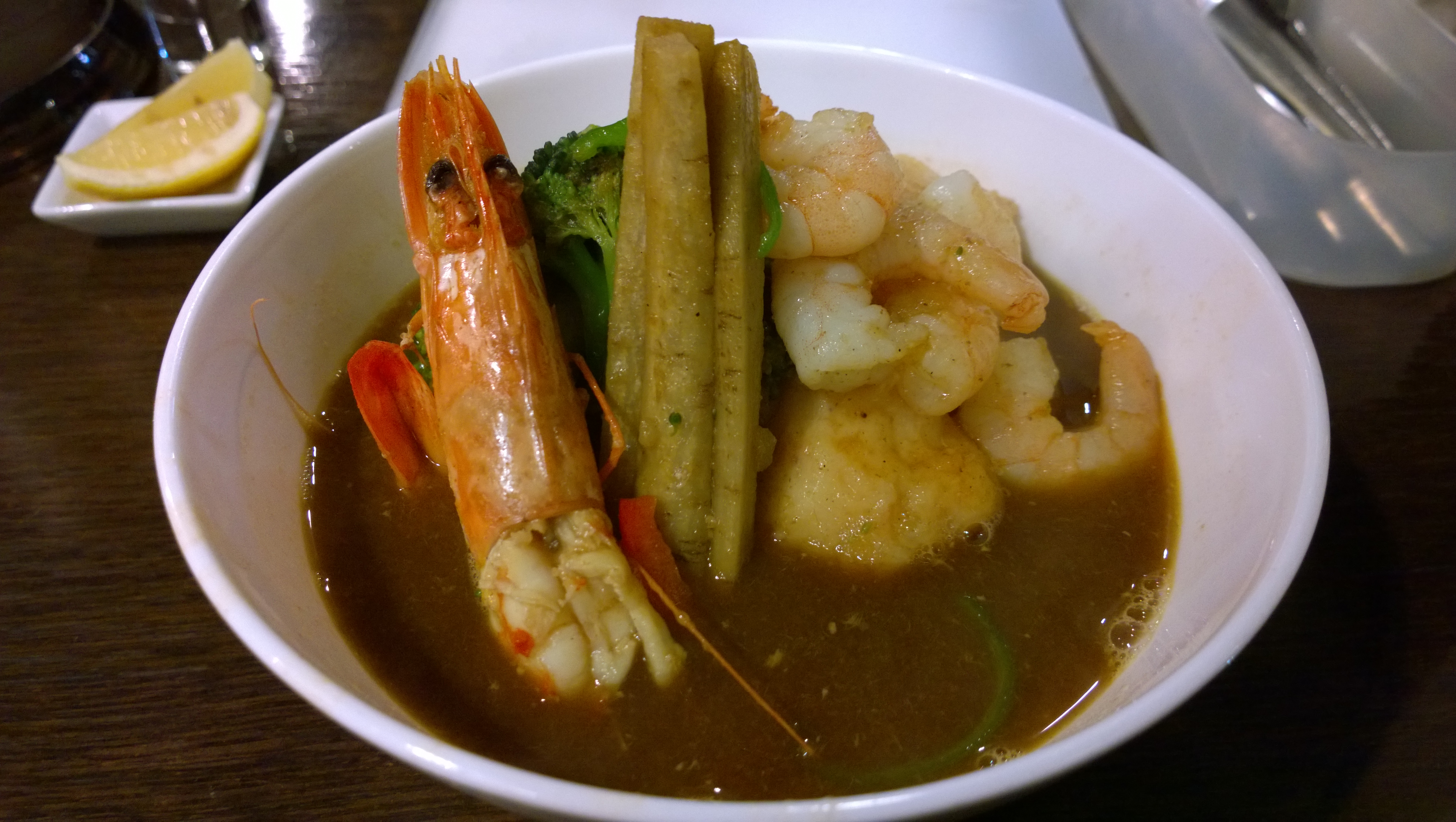 스프 카레